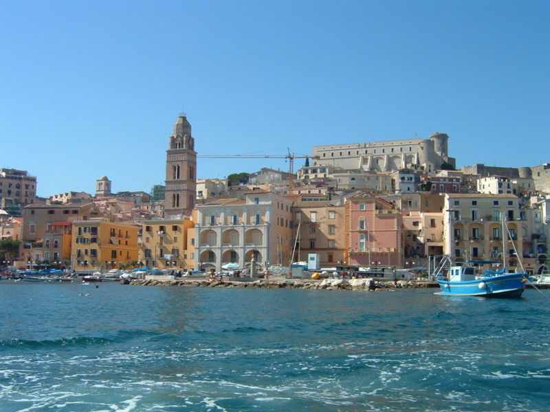 Vue de la ville de Gaeta depuis la mer